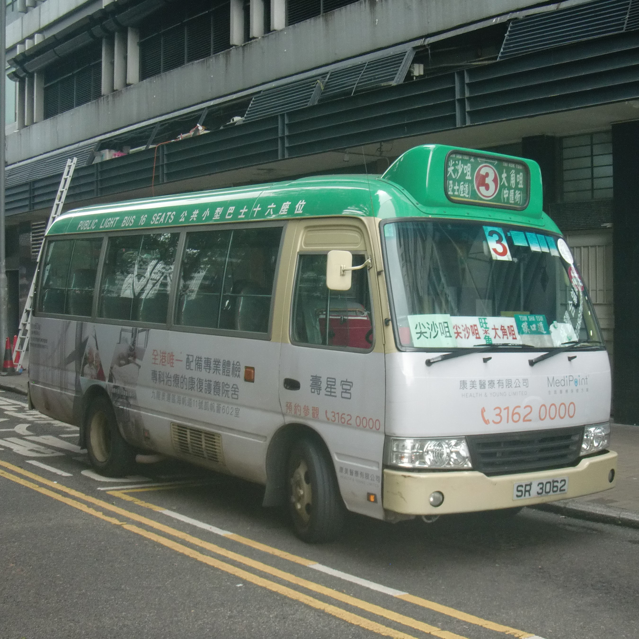 中文（香港）: 在亞士厘道準備開出的九龍區專線小巴3號線